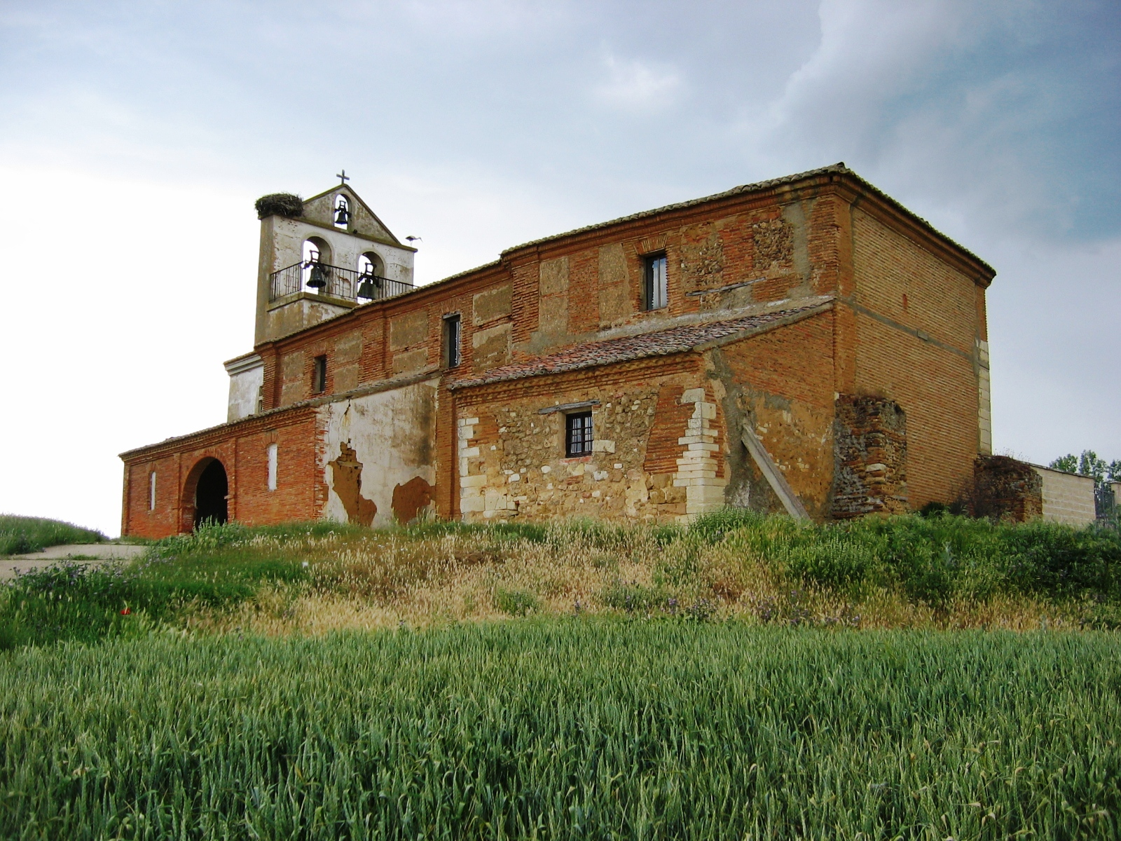 Iglesia de Villamelendro de Valdavia. Siglo XVI.